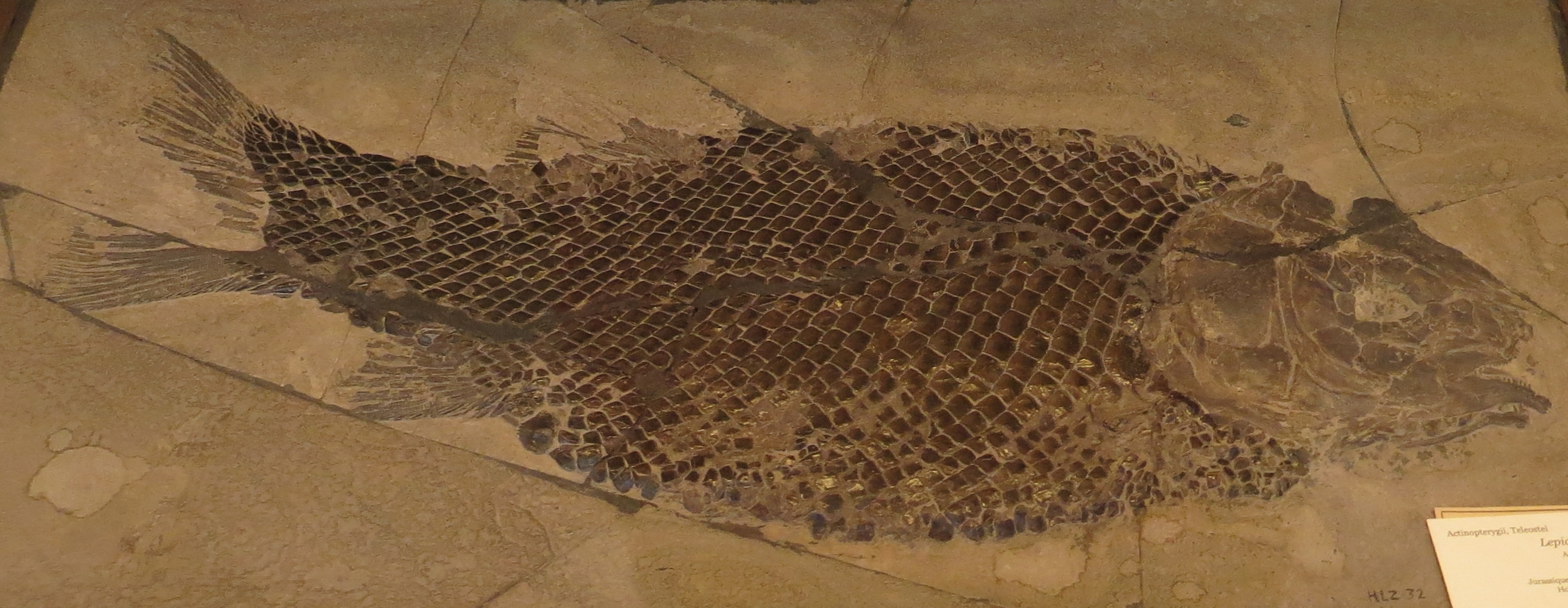 Lepidotes gigas fossil